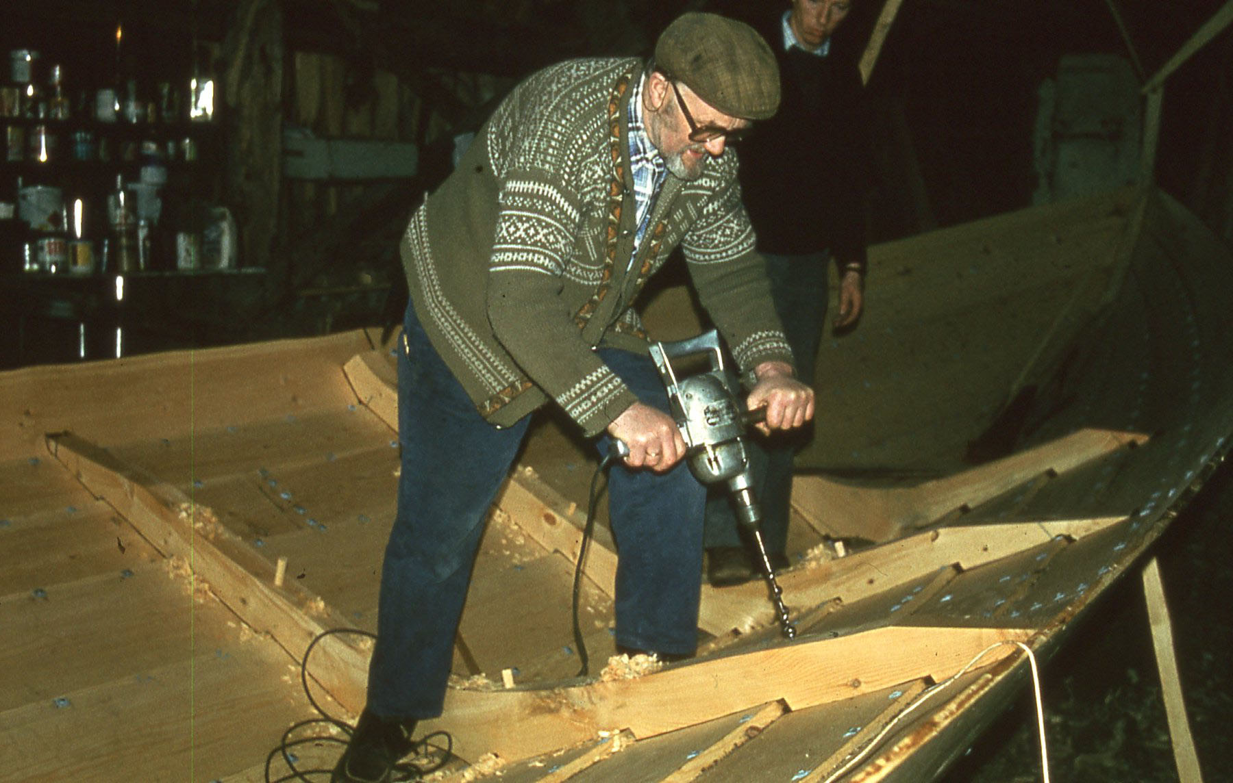 Sigurd Bjørkedal bygg Sunnmørsbåt , 1981